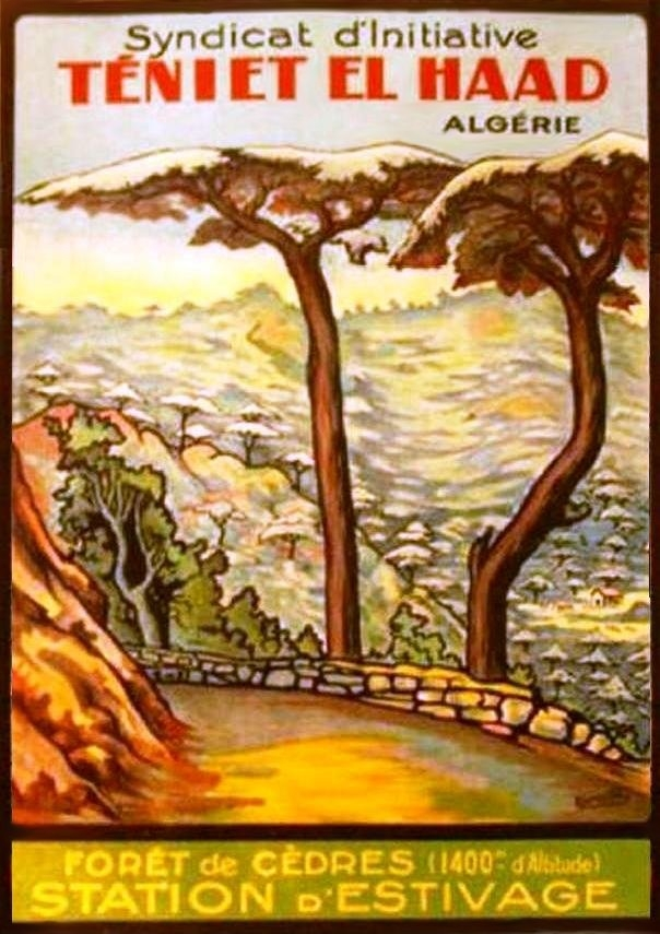 affiche publicitaire de tourisme a Théniet-El-Haad en Algerie